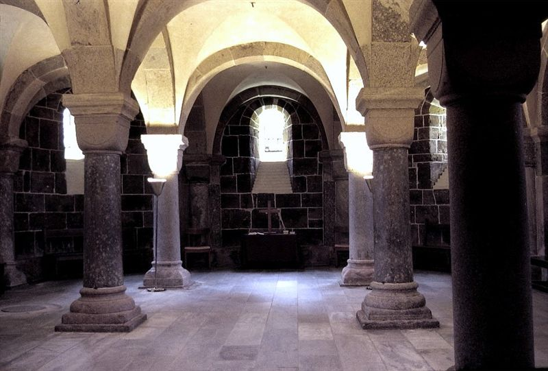 Viborg Domkirke, Krypten